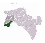 Op basis van locatiekaartjes van de provincie Groningen van Mtcv